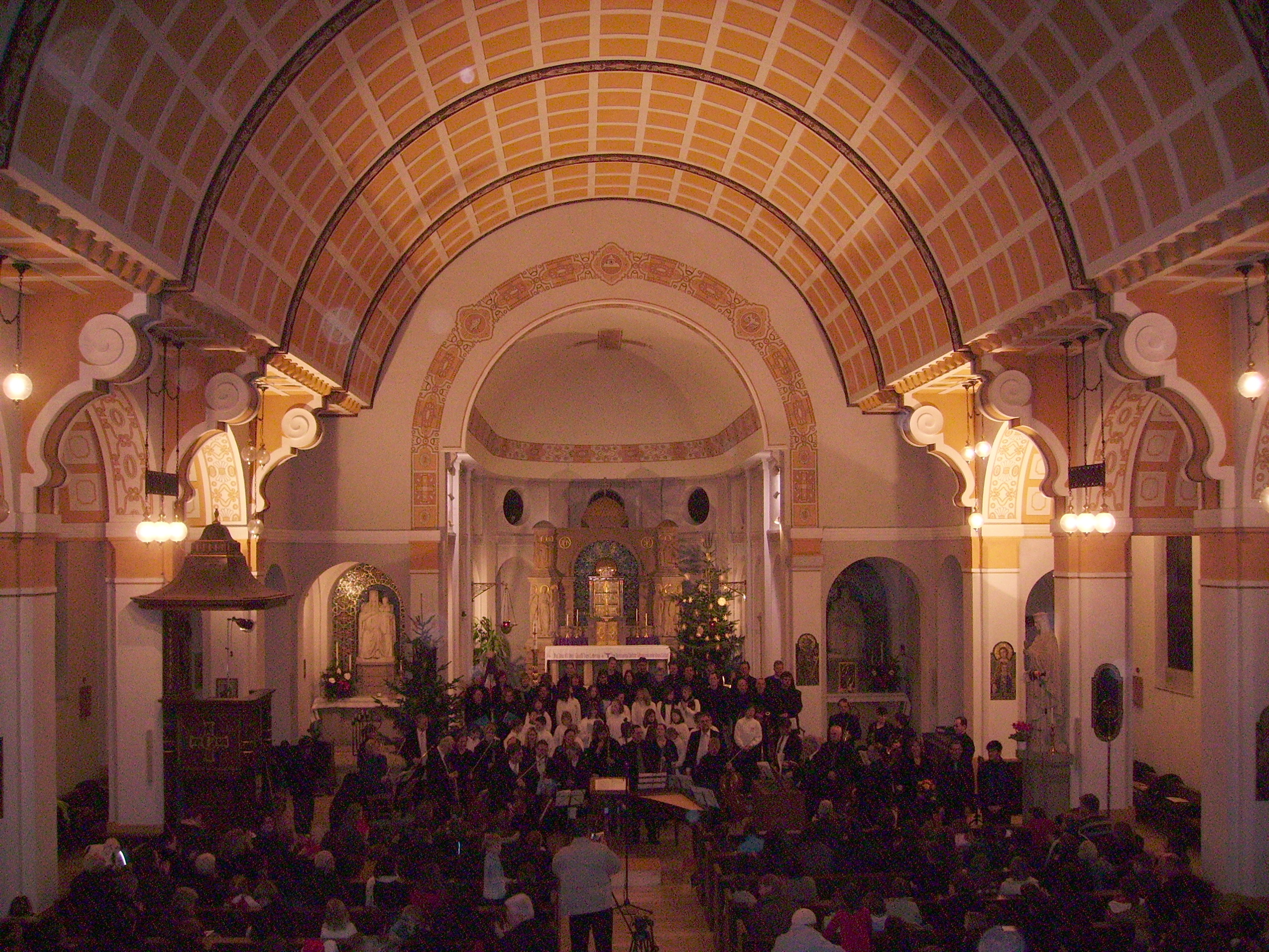 St. Joseph Ludwigshafen-Rheingönheim